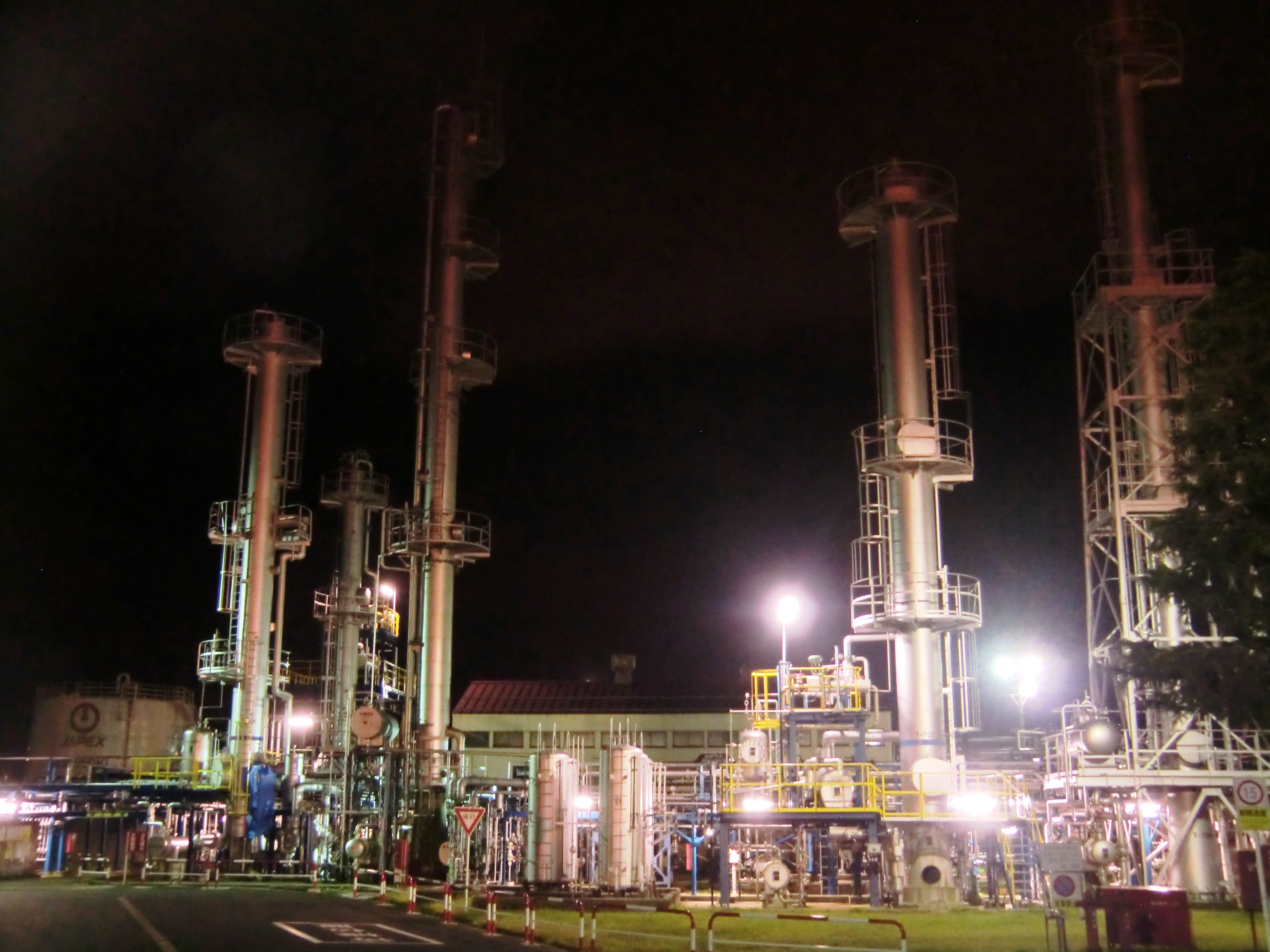 見附ガス化学工場(エスケイ産業)